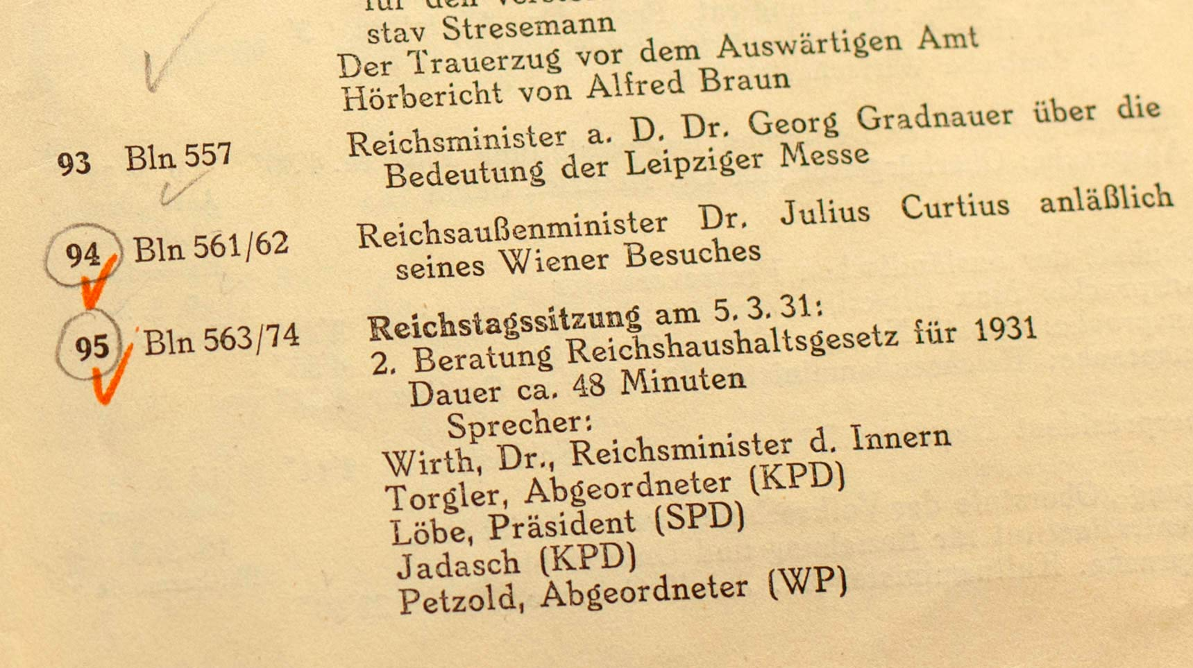 Ausschnitt aus einem Erschließungstexts über den Tonmitschnitte einer Reichstagssitzung vom 5. März 1931.